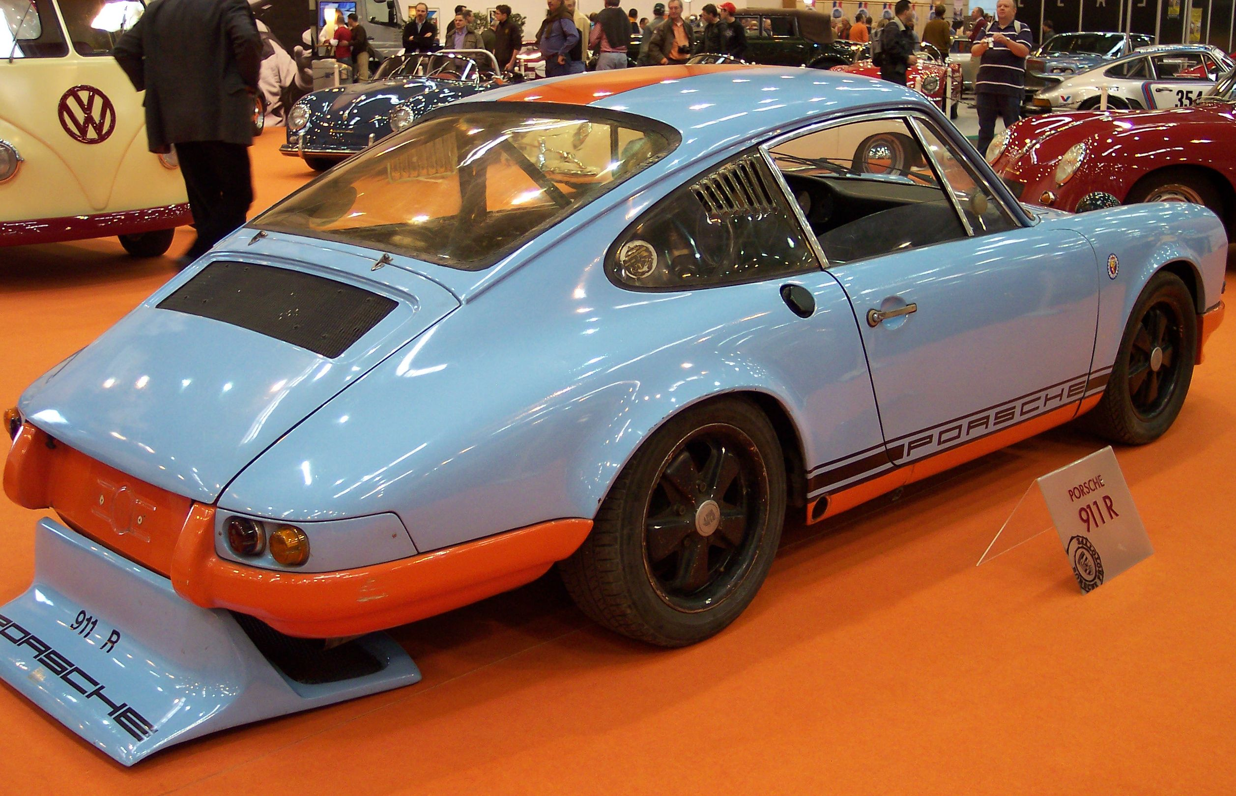 Porsche 911 R auf der Techno-Classica 2007.